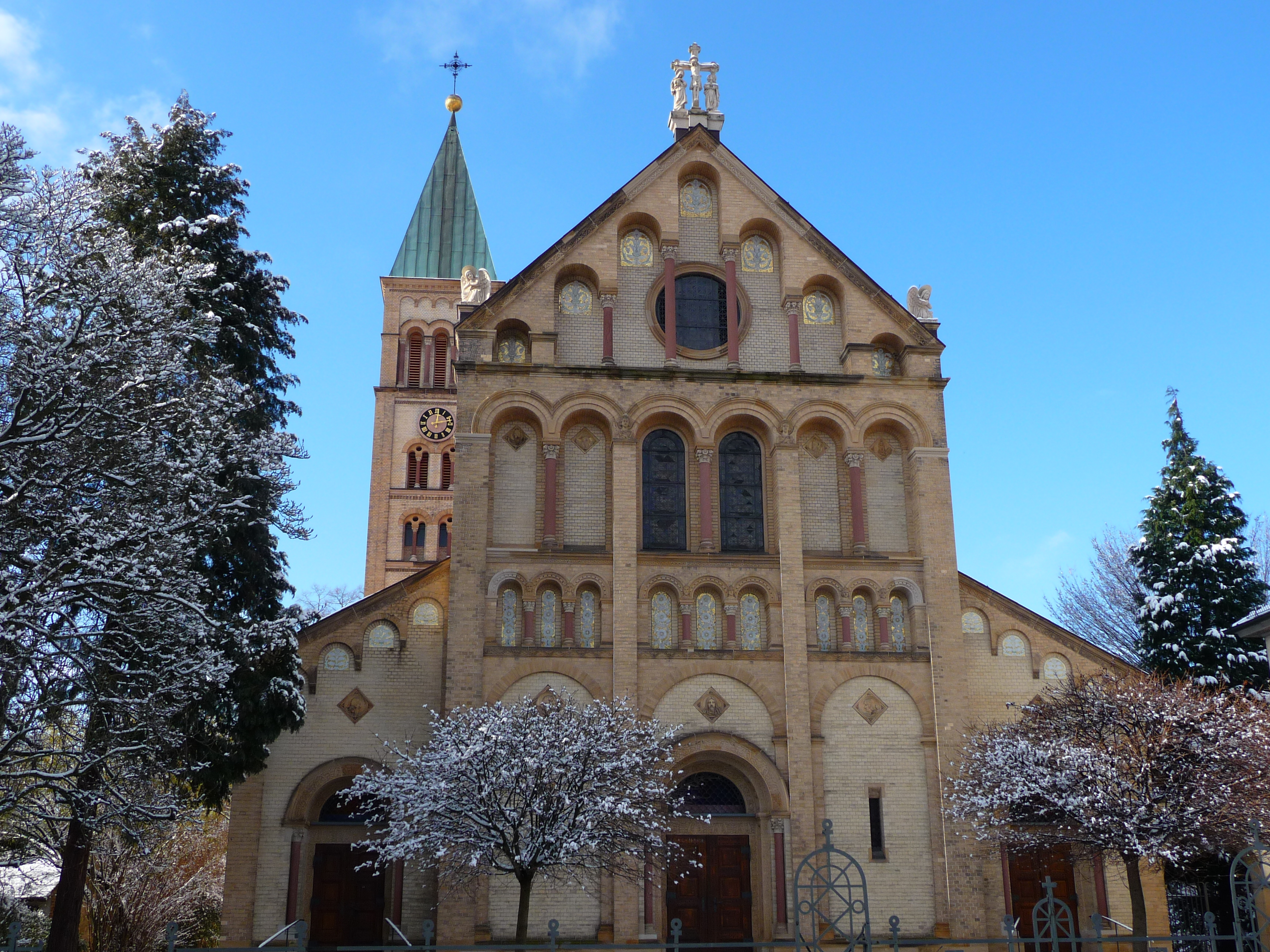 Ansicht der katholischen Kirche St. Raphael in Heidelberg-Neuenheim von Osten